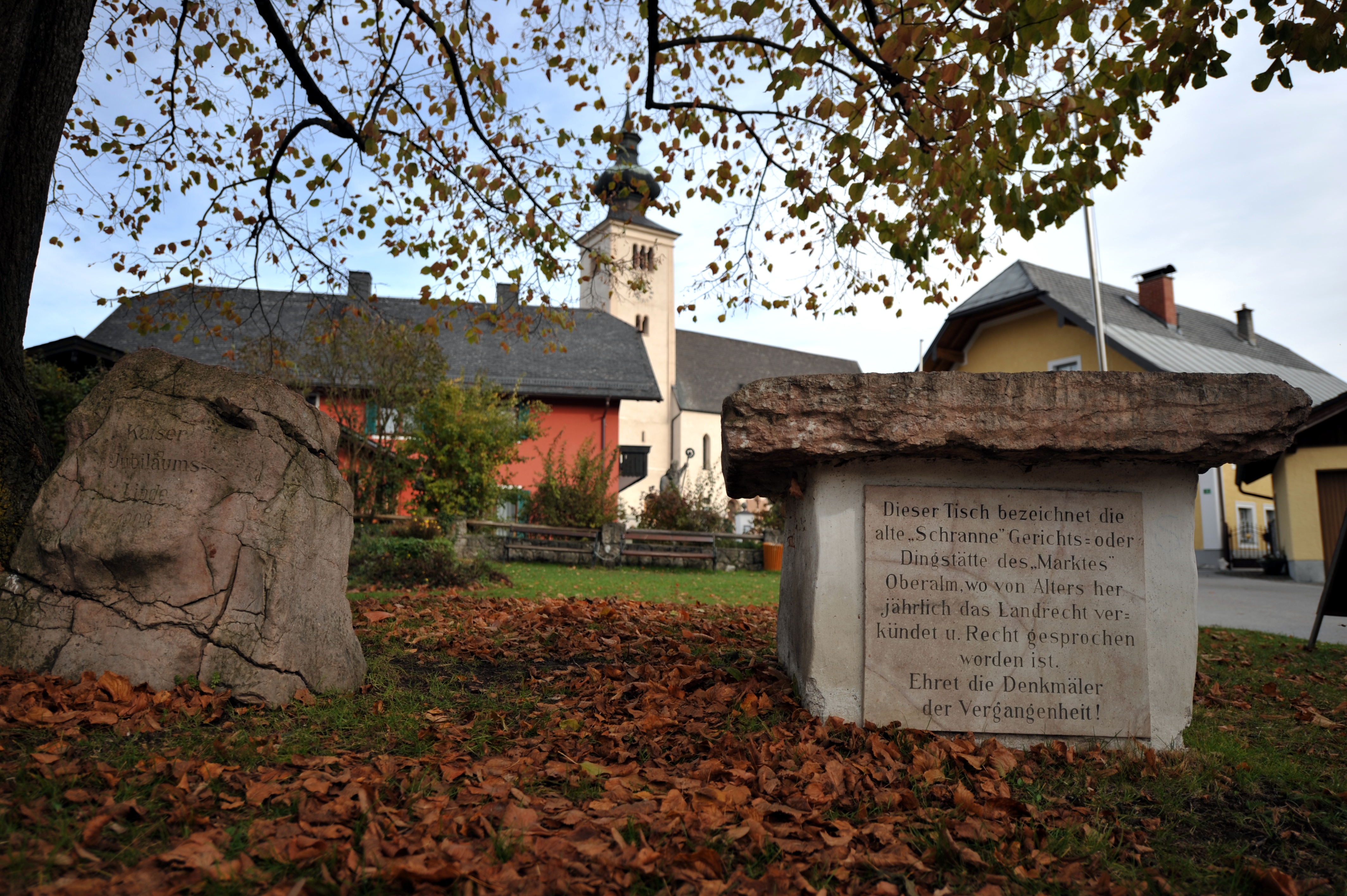 Schranne (Thaiding), dahinter Pfarrkirche hl. Stephan. Oberalm.